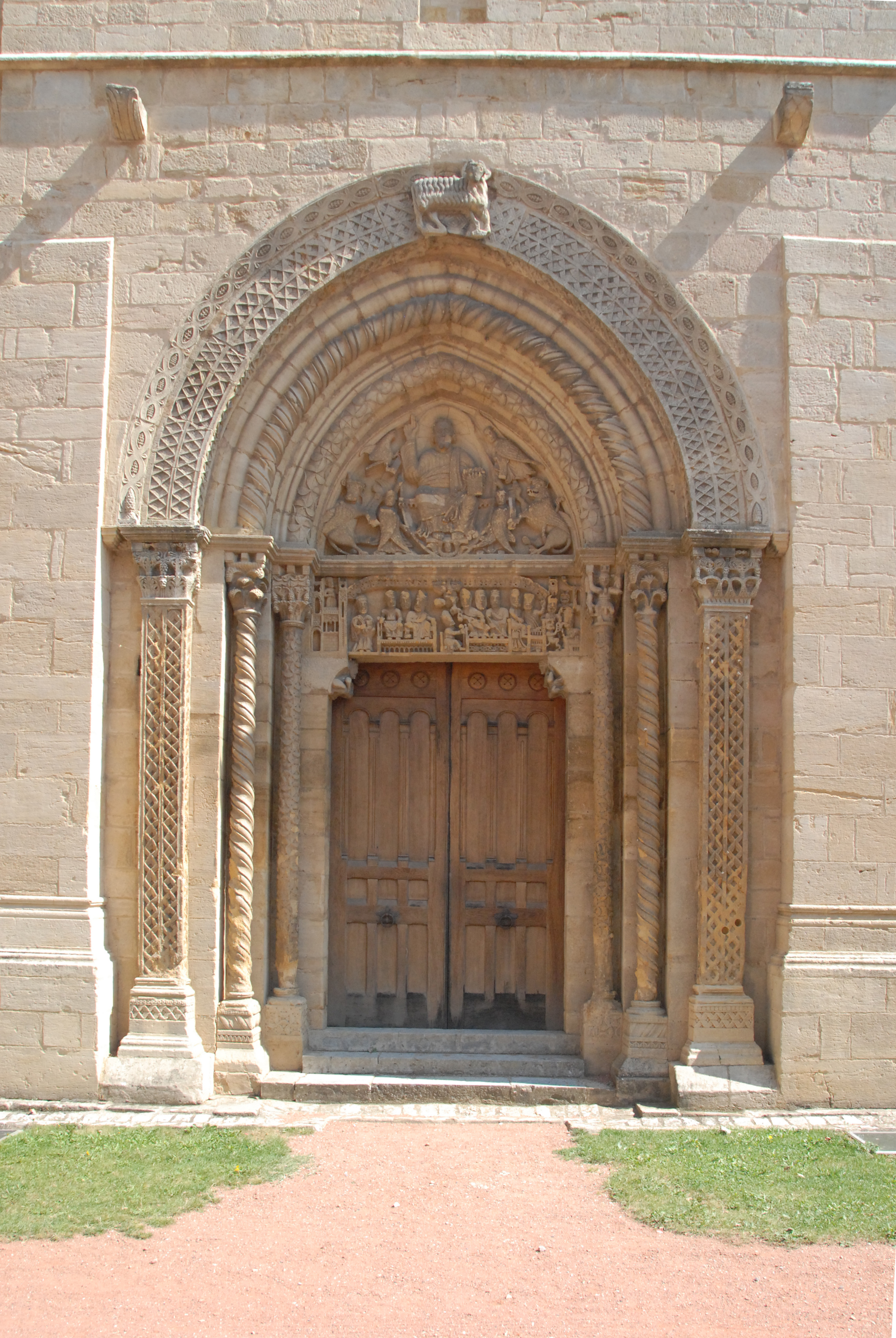 St-Hilaire de Semur-en-Brionnais, Hauptportal